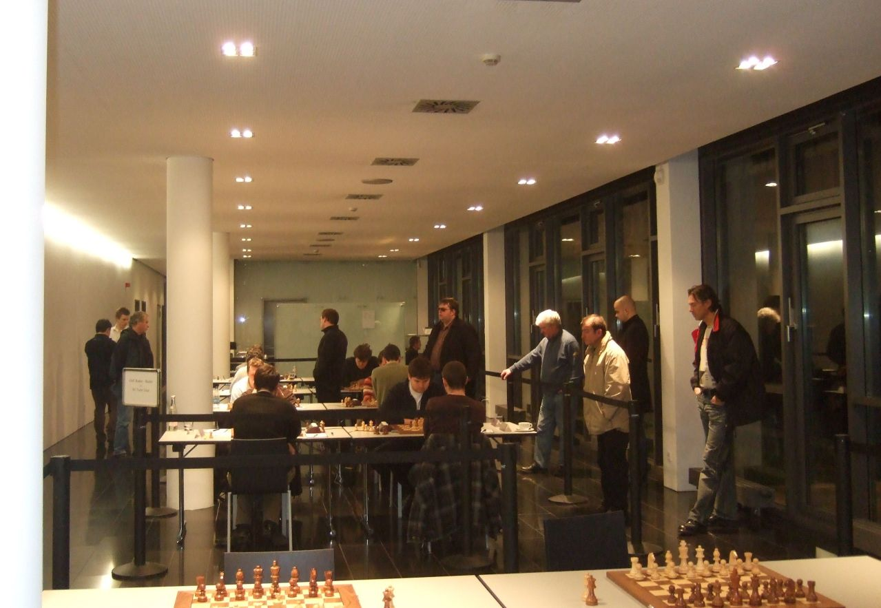 OSC Baden-Baden vs. SG Turm Trier am 14. Dez. 2007 im Hause der Grenkeleasing AG